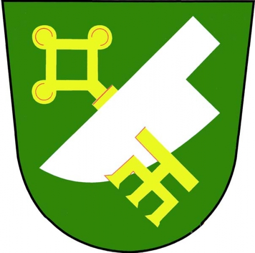 znak, Klučov, okres Třebíč